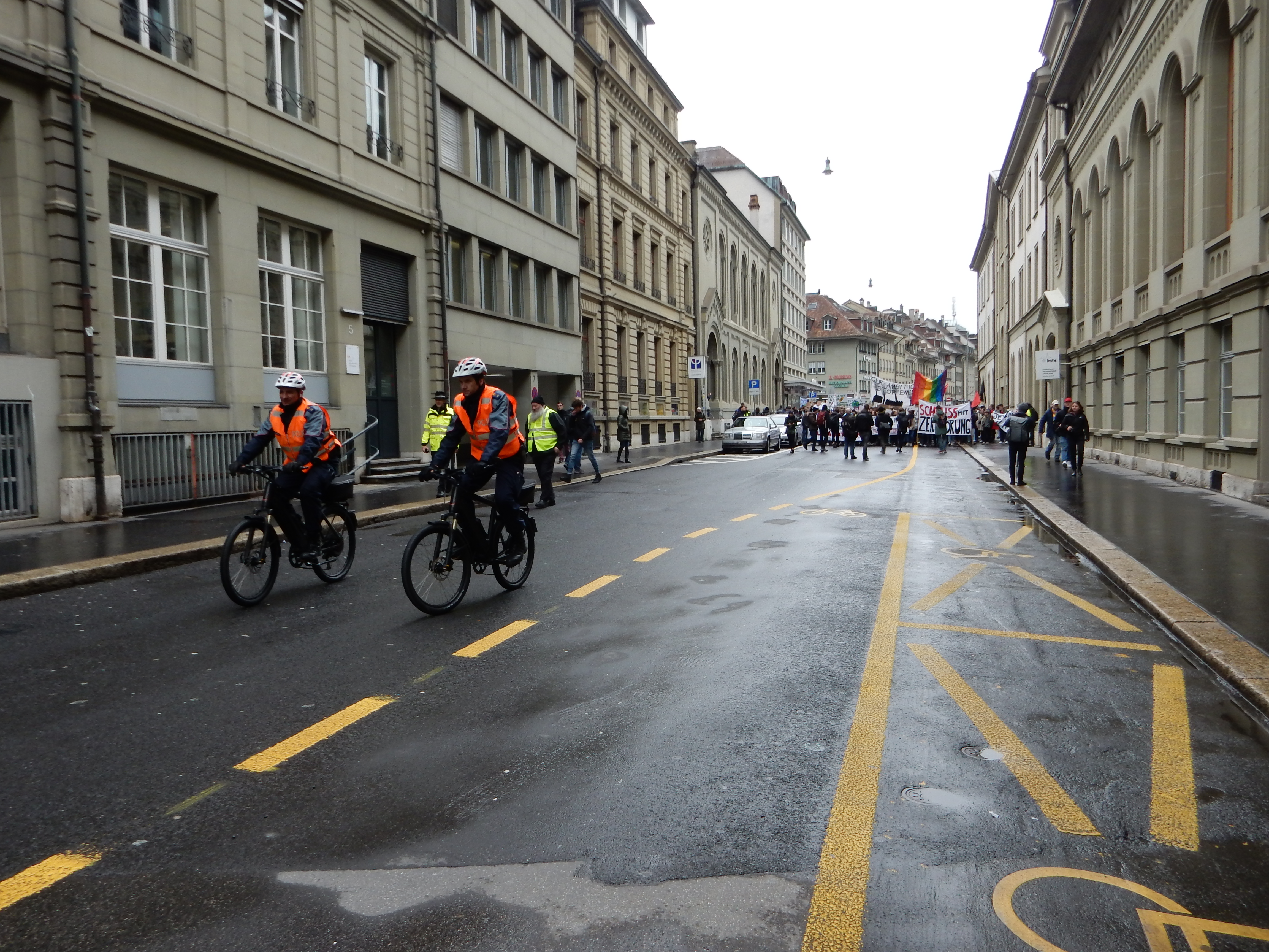 Klimastreikdemo Bern (Schweiz): Zwei Polizisten fahren auf Fahrrädern vor der Kundgebung durch die Speichergasse